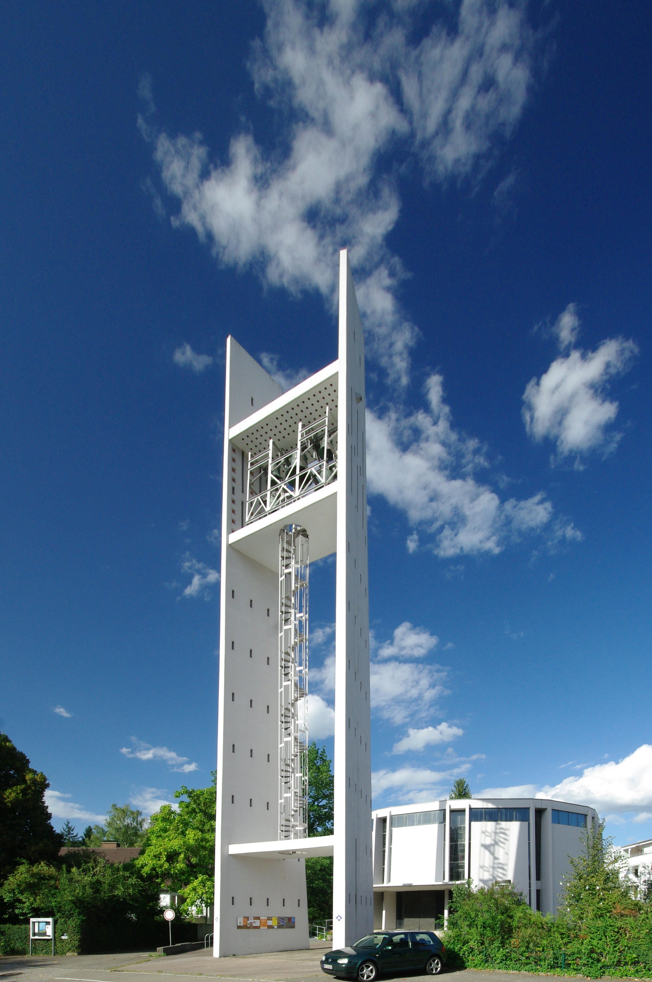 Auferstehungskirche